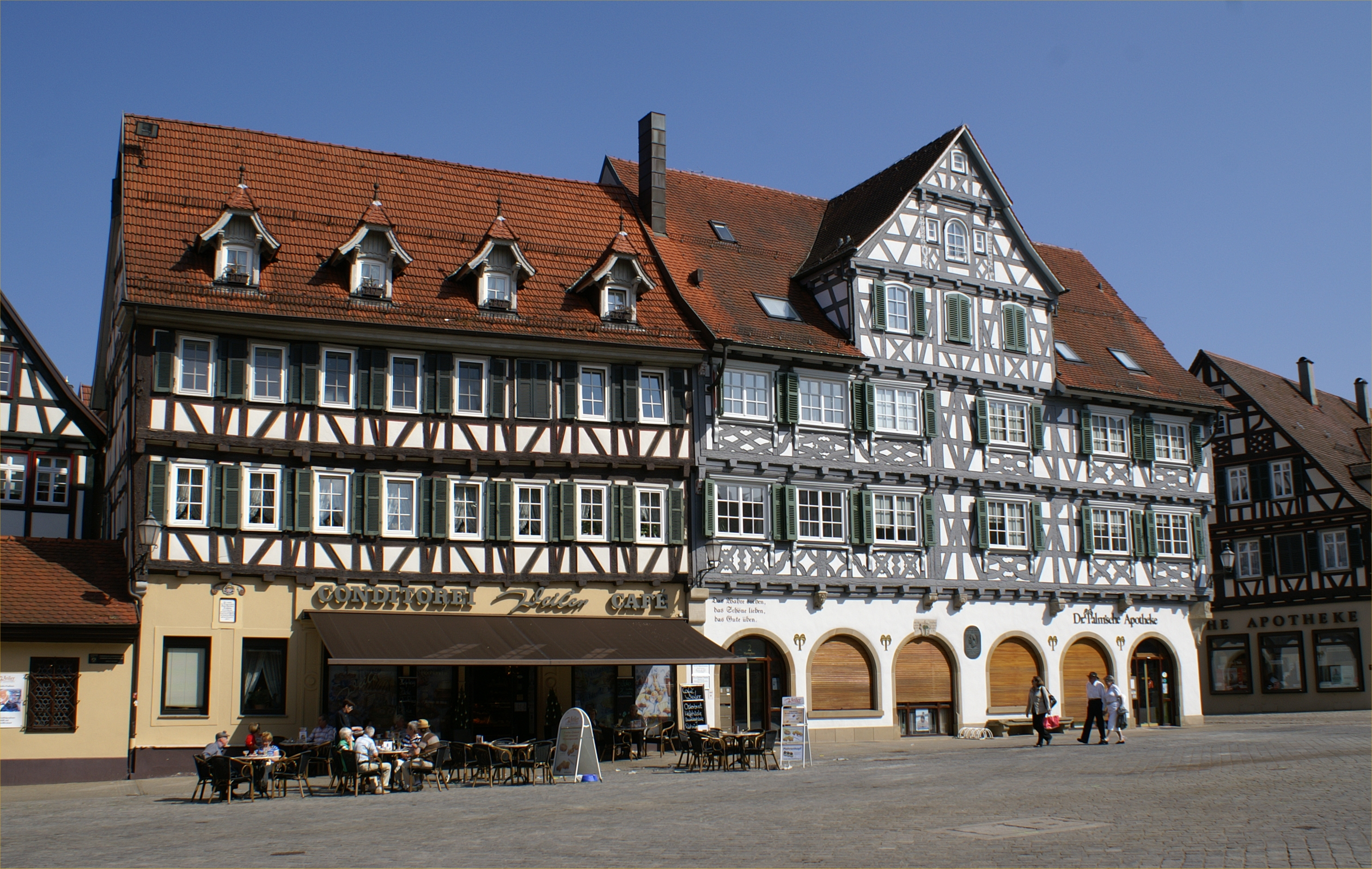 Schorndorf, Baden-Württemberg: Palm'sche Apotheke